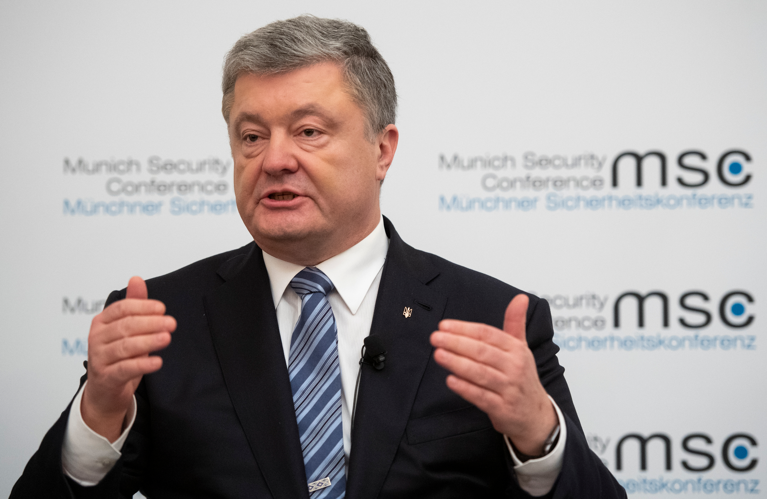 Petro Poroshenko während der Münchener Sicherheitskonferenz 2019